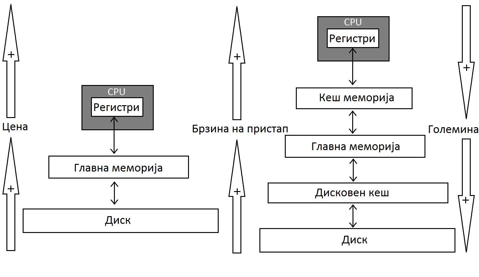 Приказ на местото на кеш меморијата и хиерархијата во компјутерските системи.